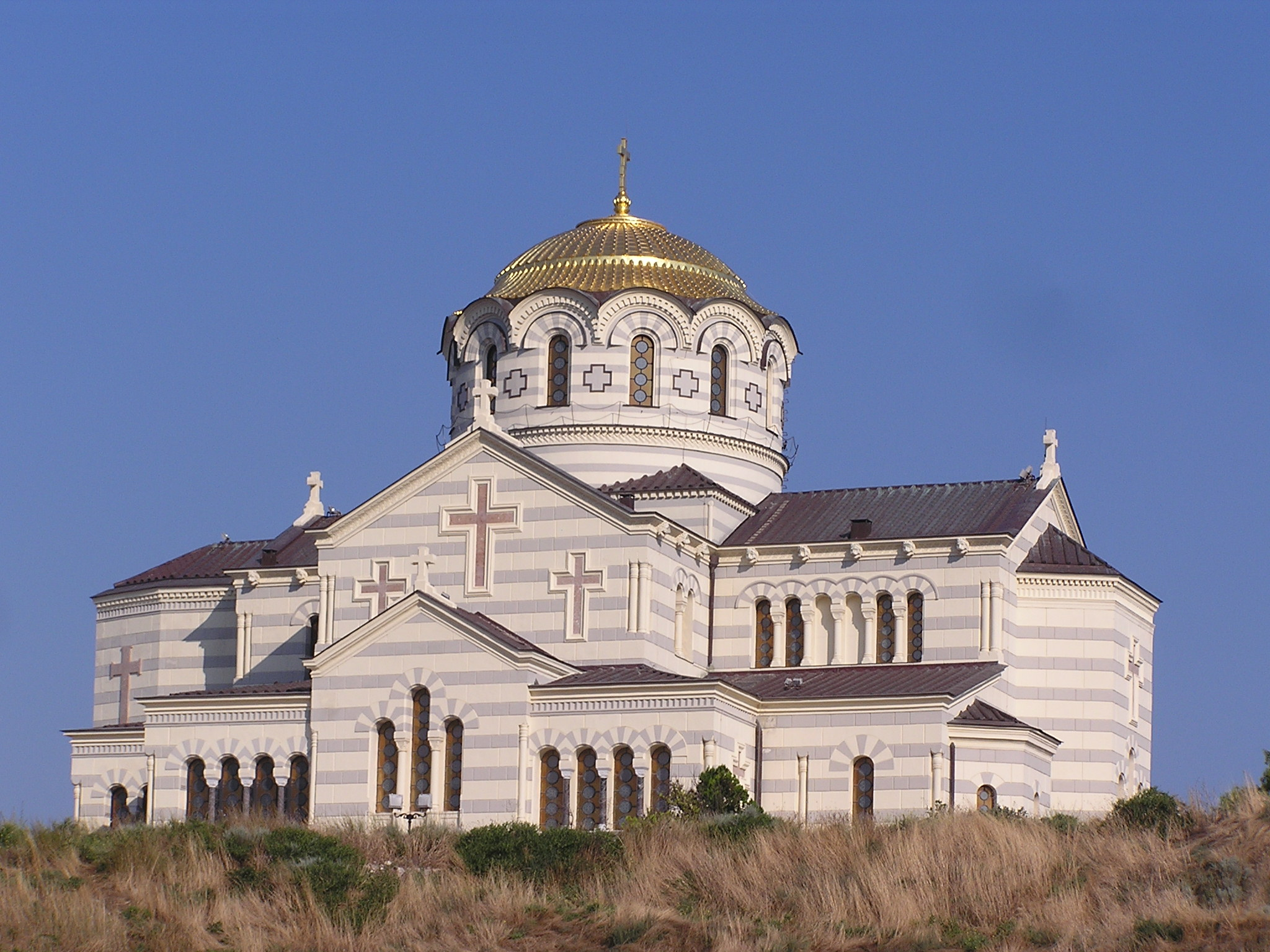 Херсонес. Храм святого Владимира